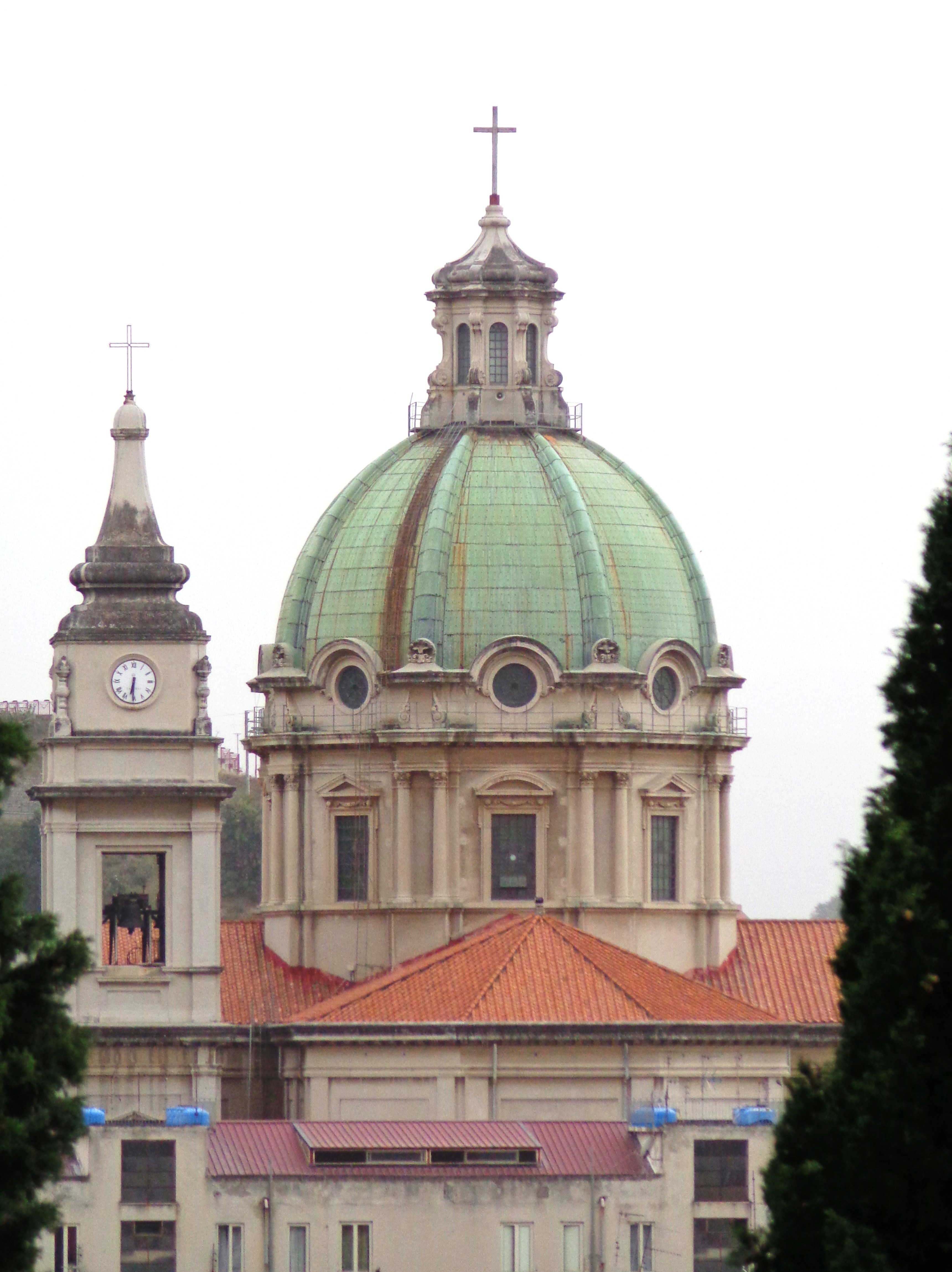 Cupola Basilica Minore di San Sebastiano Barcellona Pozzo di Gotto, vista da Pozzo di Gotto.